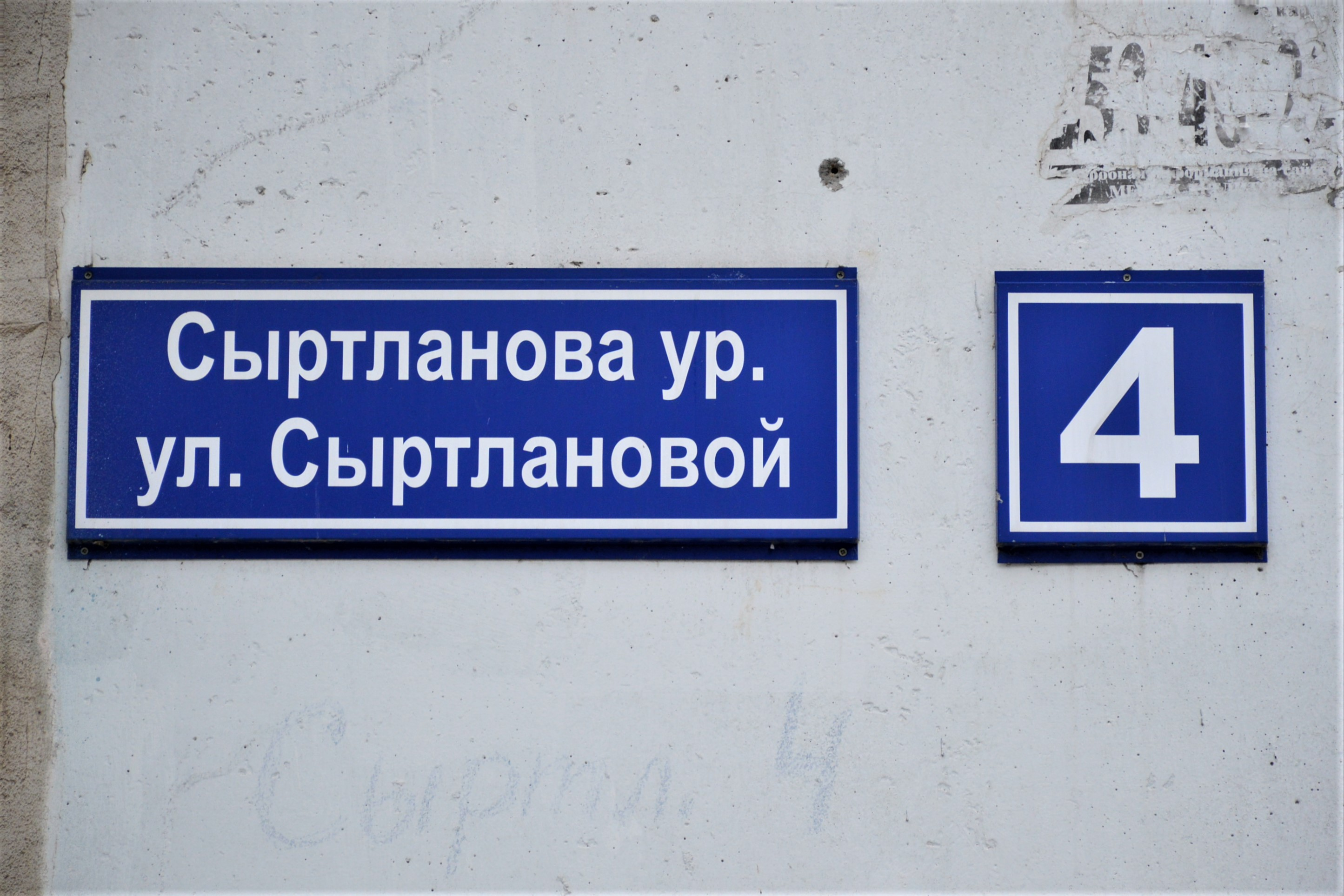 Казань, Горки. Адресная табличка на доме: ул. Сыртлановой, 4